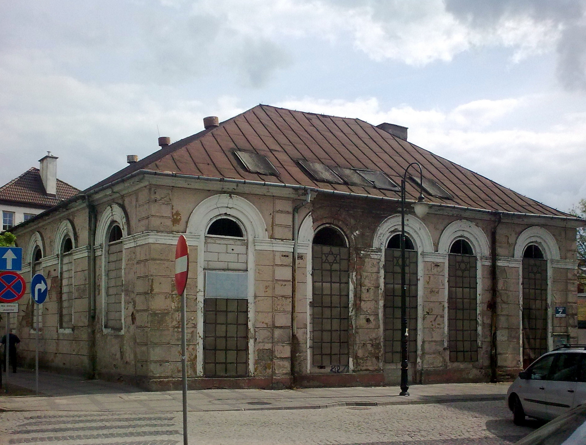 Płock, ul. Kwiatka 7 - Mała Synagoga, obecnie nieużytkowana (zabytek nr 513 z 28.03.1962).